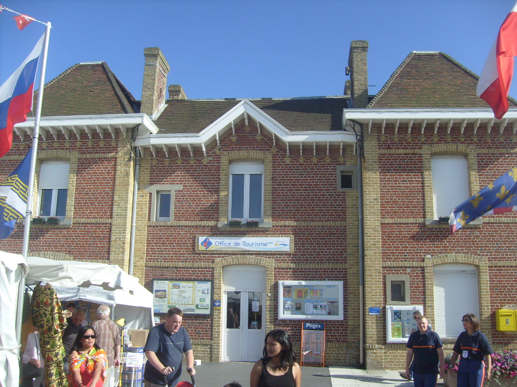 Mairie de Bray-Dunes